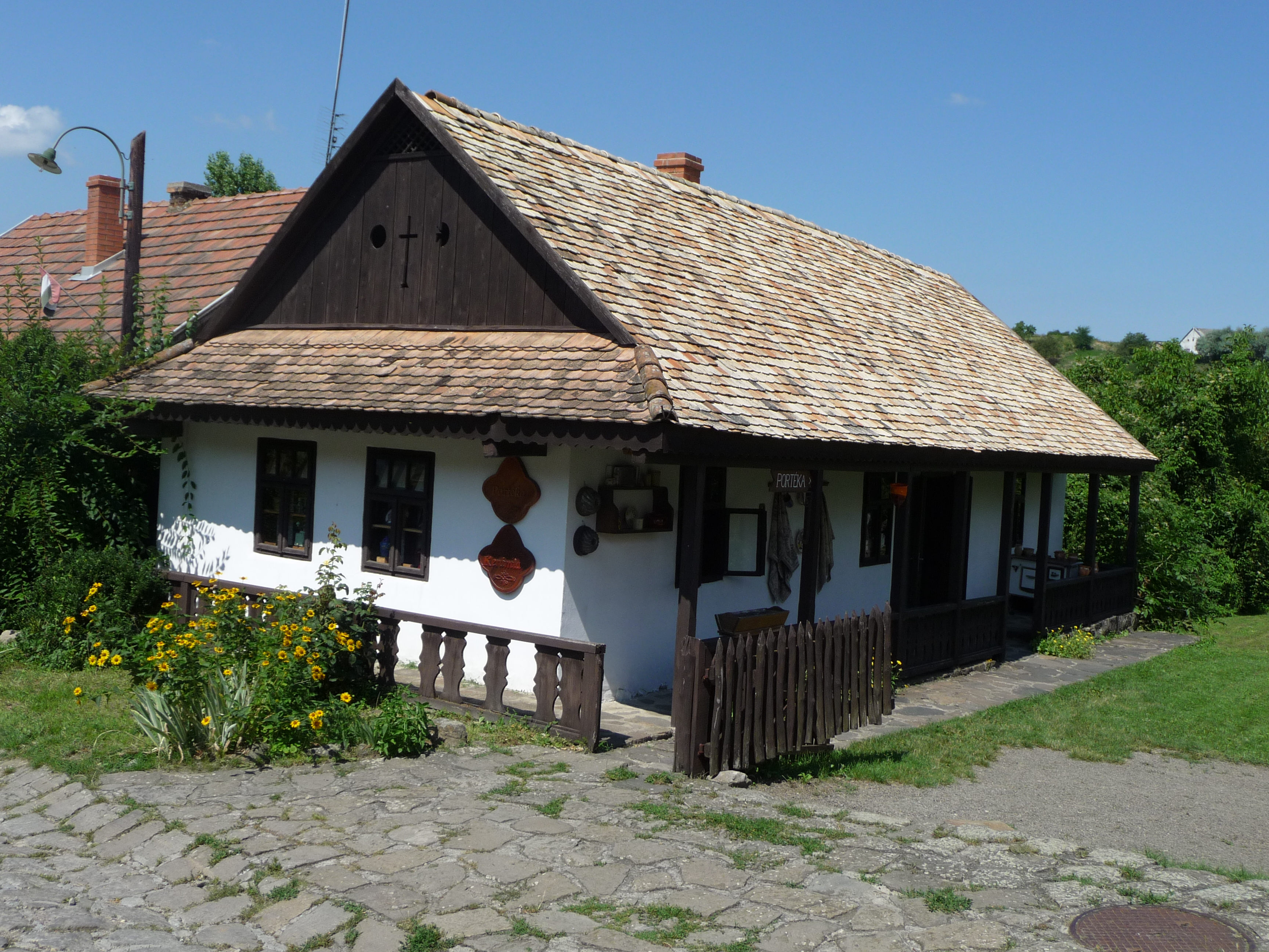 Hollókő, Kossuth L. út 75.